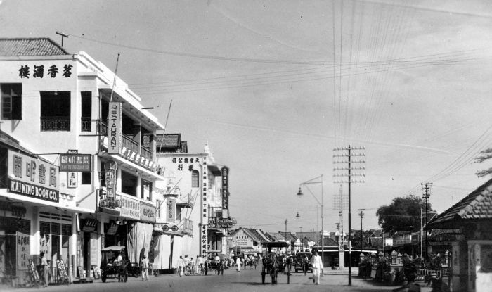 Repronegatief. Chinese winkels langs de Pantjoran, een drukke winkelstraat in Batavia